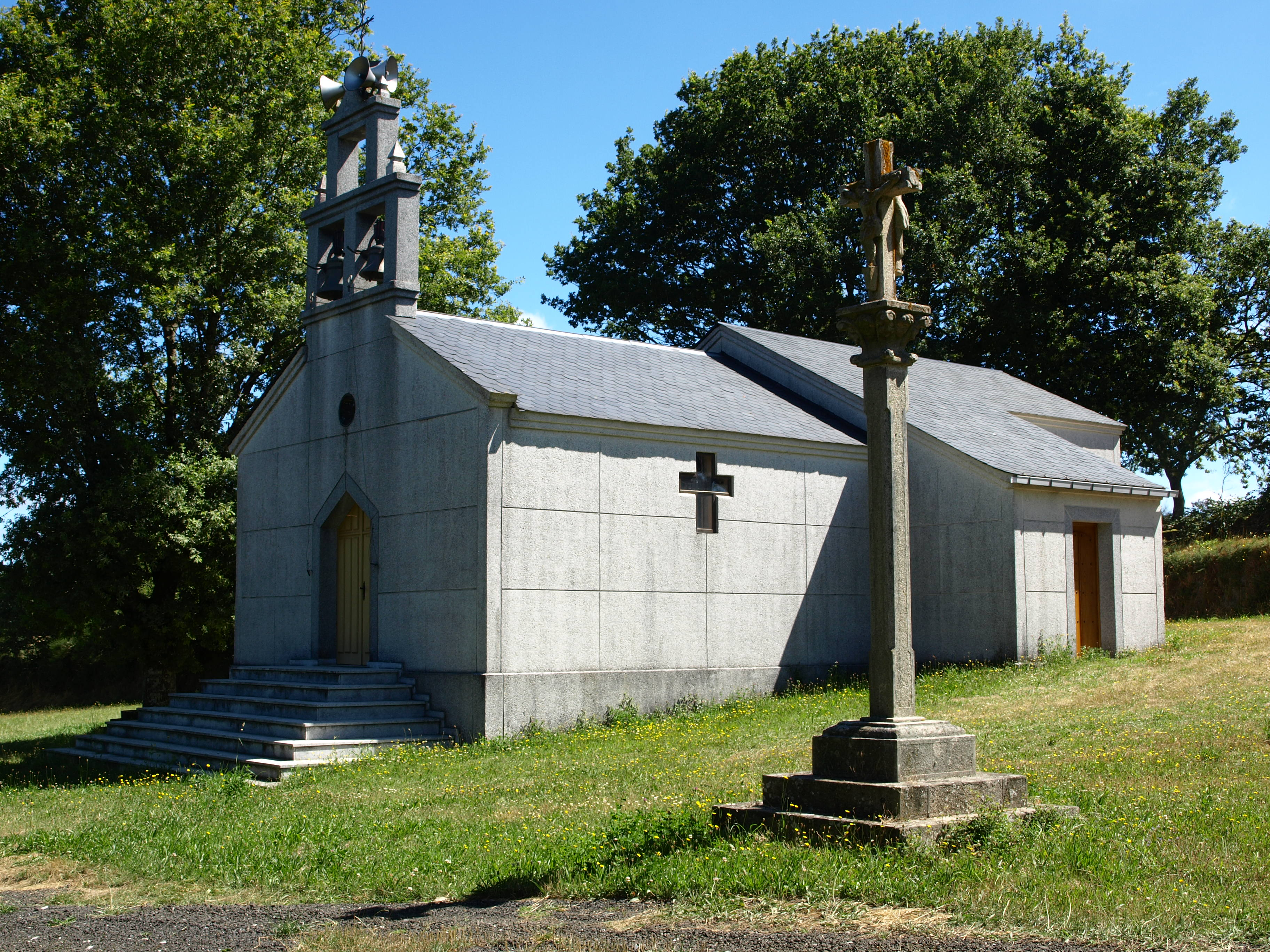 Igrexa parroquial de Santiago de Soengas (Portomarín)